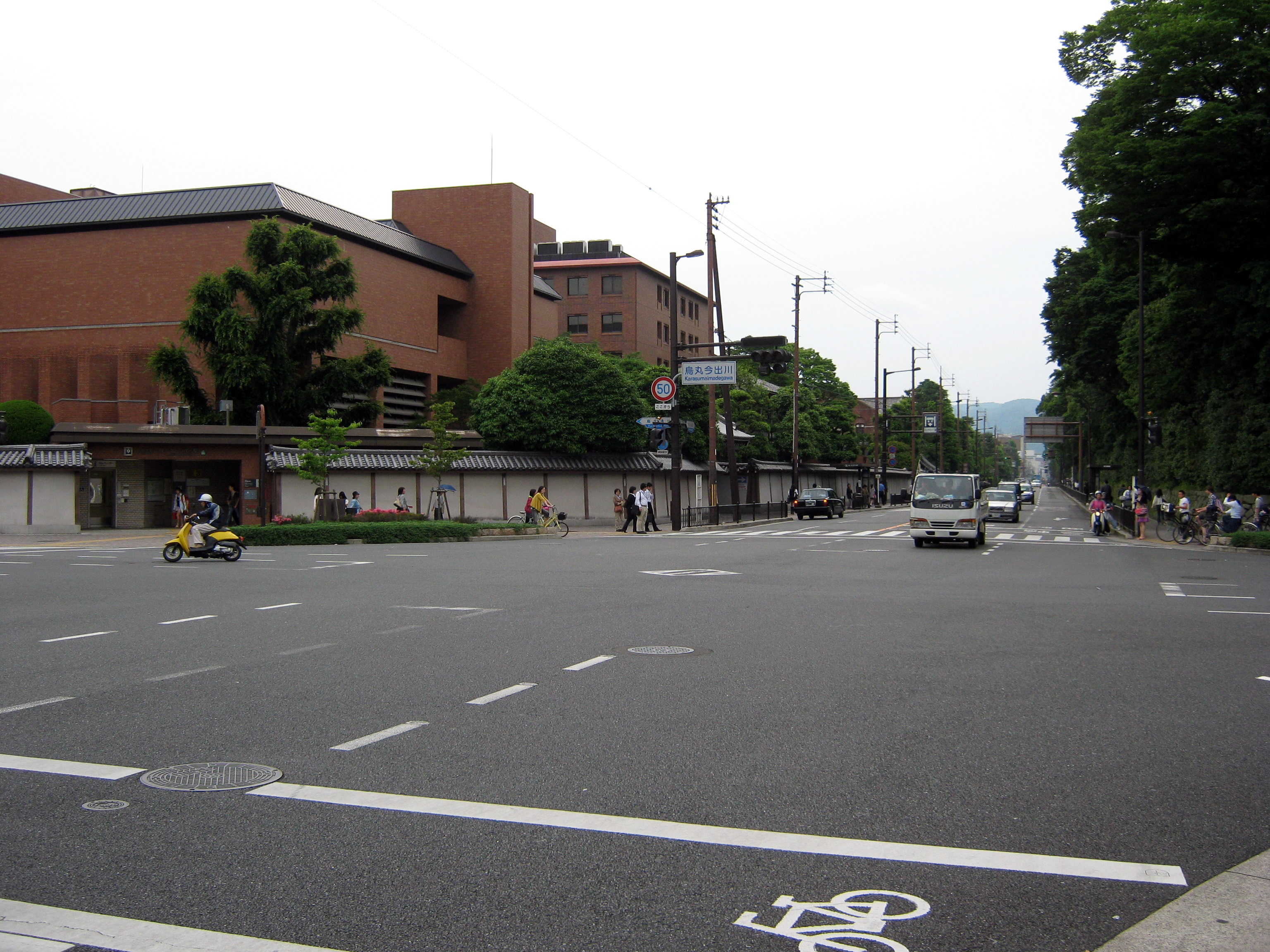 烏丸今出川